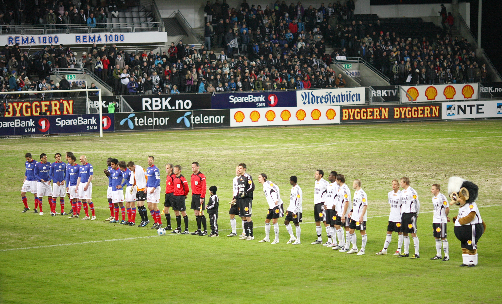 RBK - VIF 18